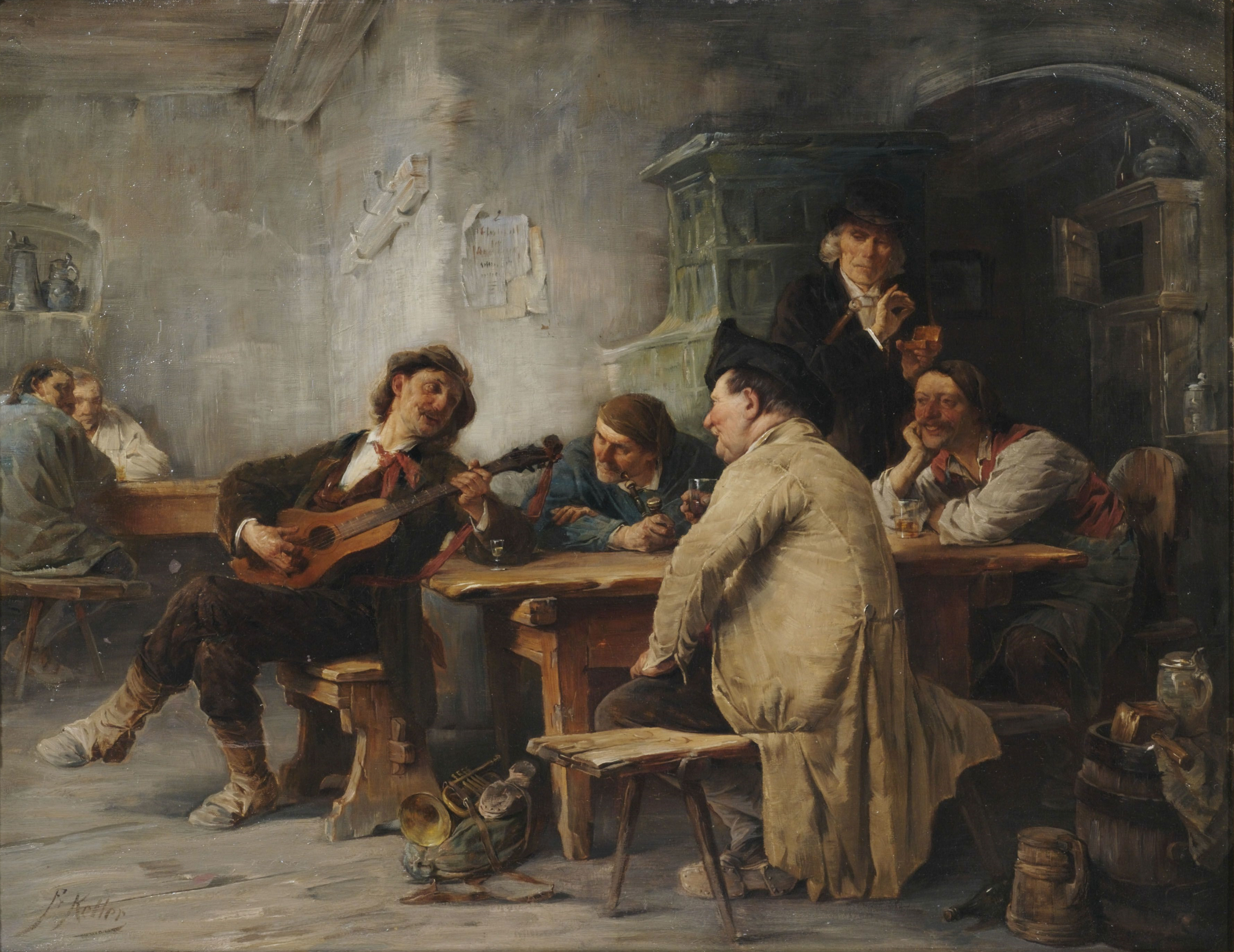 Der fahrende Sänger. Öl auf Leinwand, unten links signiert. 74 x 94 cm. Provenienz: Sammlung Gert Nagel.